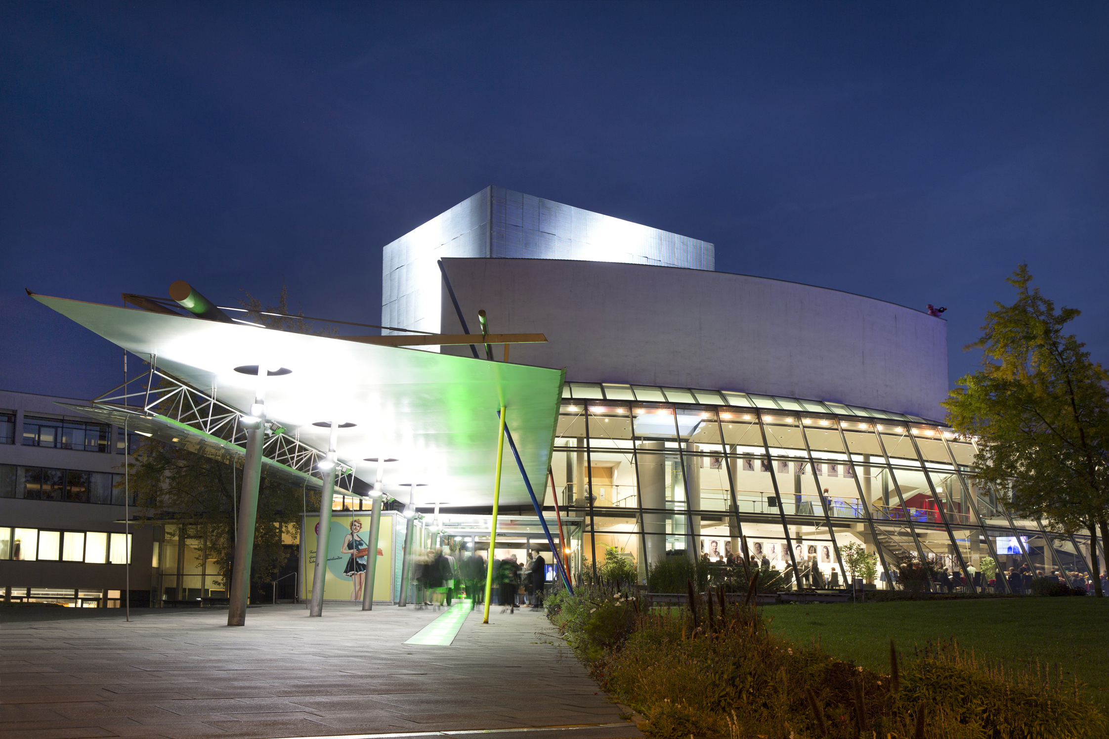 Außenansicht Theater Hof